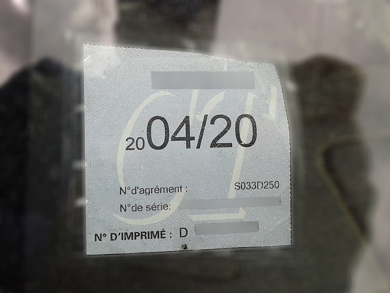 Une vignette du contrôle technique français délivrée en 2018 et expirant en avril 2020.